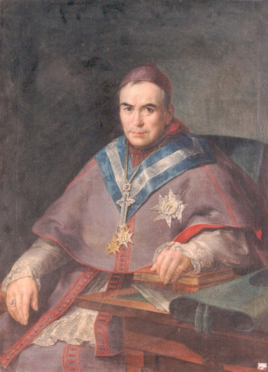 Retrato del eclesiástico español Jaime Creus Martí (1760-1825), que fue obispo de Menorca y arzobispo de Tarragona y presidente de las Cortes de Cádiz entre finales de junio y julio de 1811, durante la Guerra de la Independencia Española.